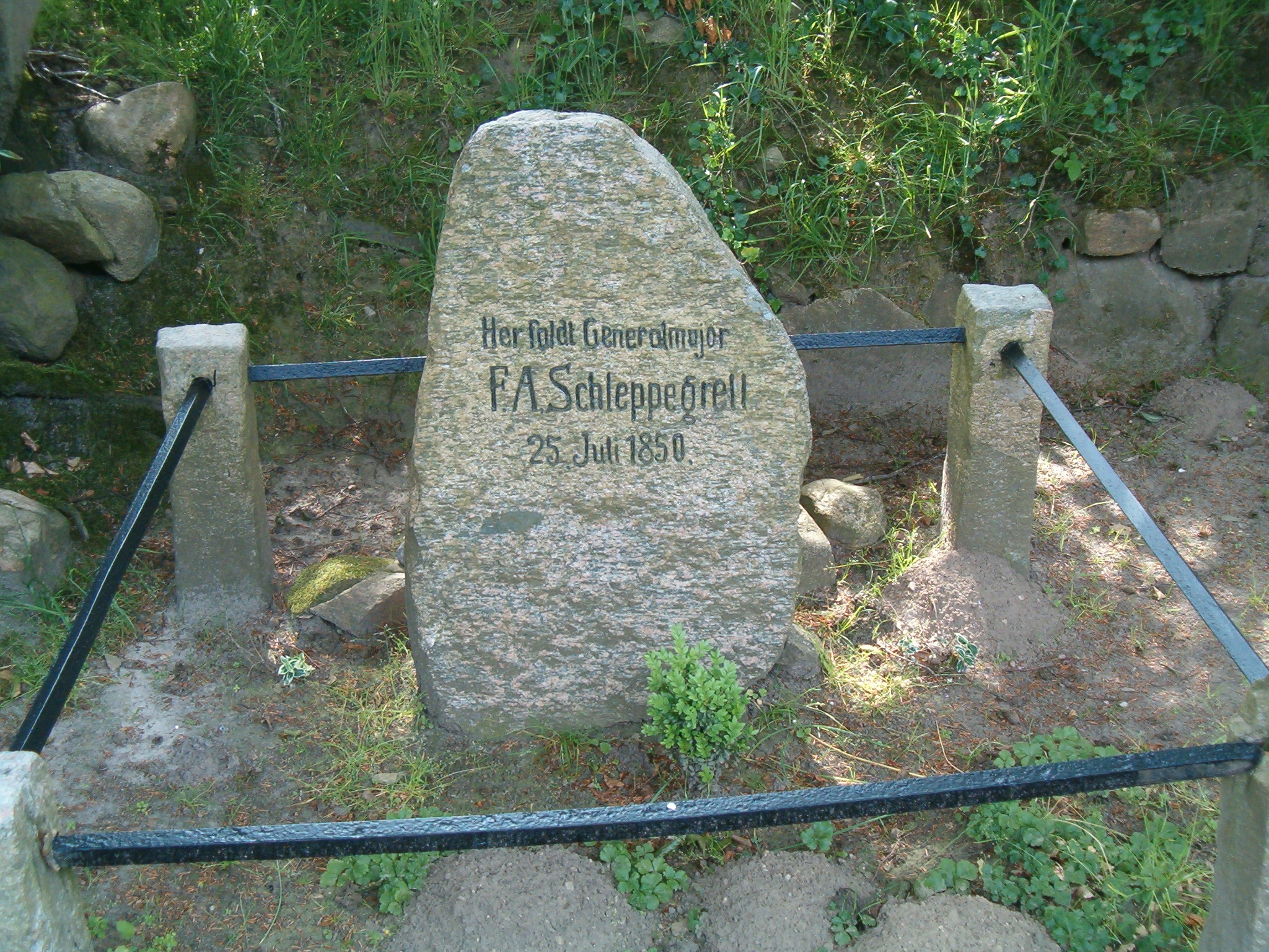 Mindestenen på det sted ved Isted, hvor Frederik Adolph von Schleppegrell faldt i kamp.